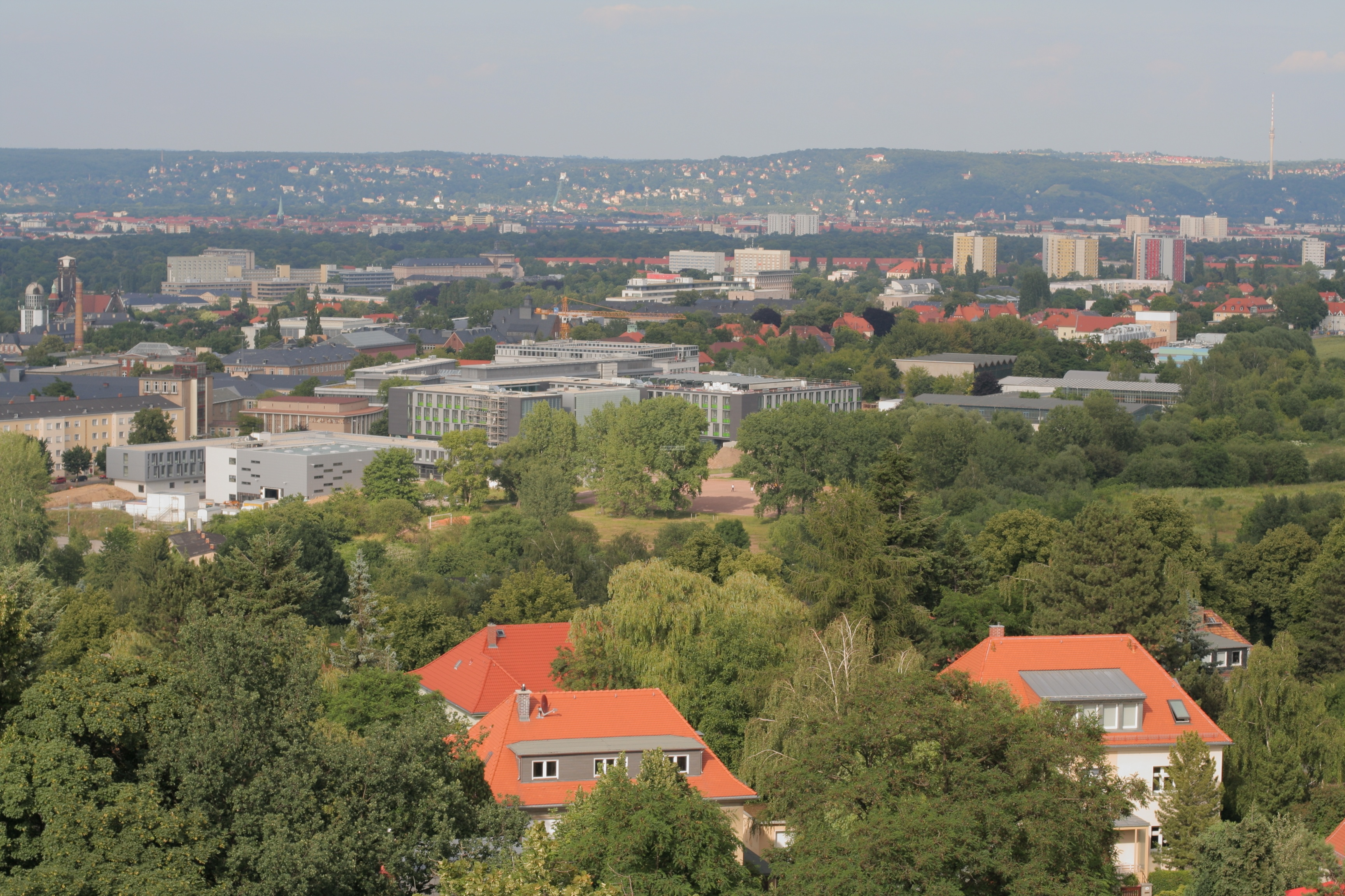 Blick von Dresden-Süd (Plauen/Coschütz) Richtung Nord/Nordost.